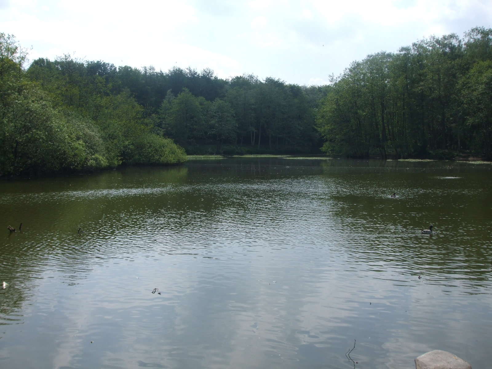 Blick über das Thorsberg Moor, Süderbrarup. Udsigt over Thorsbjerg Mose, Sønder Brarup. View over Thorberger Moor, Süderbrarup.